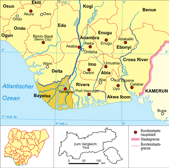 Politische Karte Nigerias (Bundesstaat Bayelsa hervorgehoben)